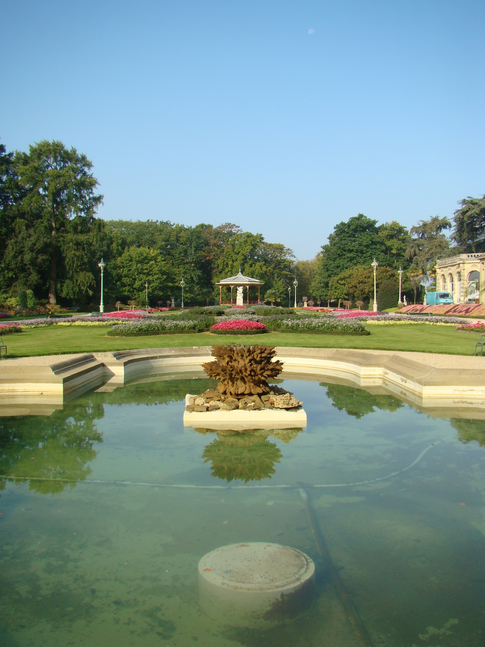 Une fontaine du Thabor et l'alignement géométrique du parc à la française.